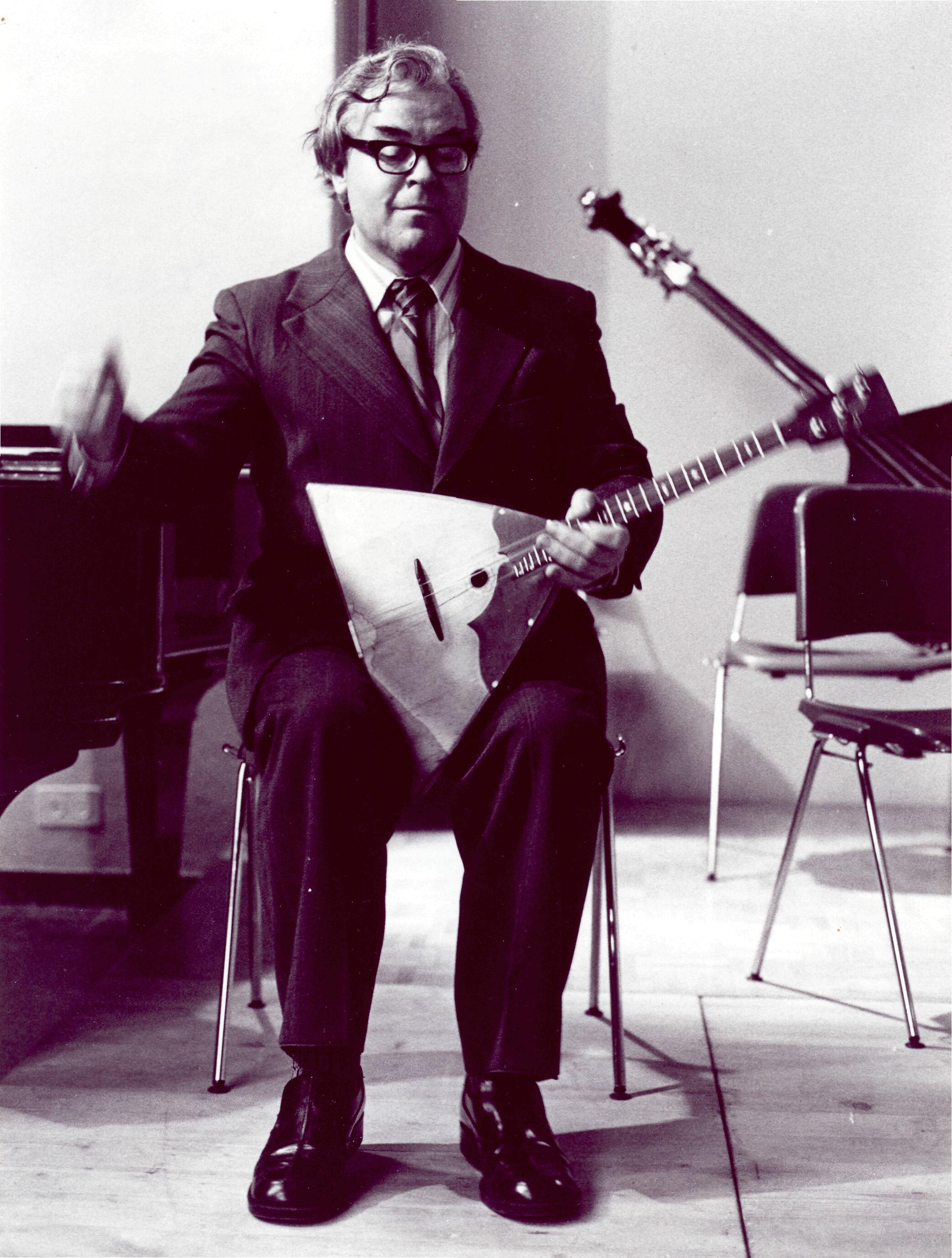 Мастер-класс в Лозаннской консерватории (Швейцария)